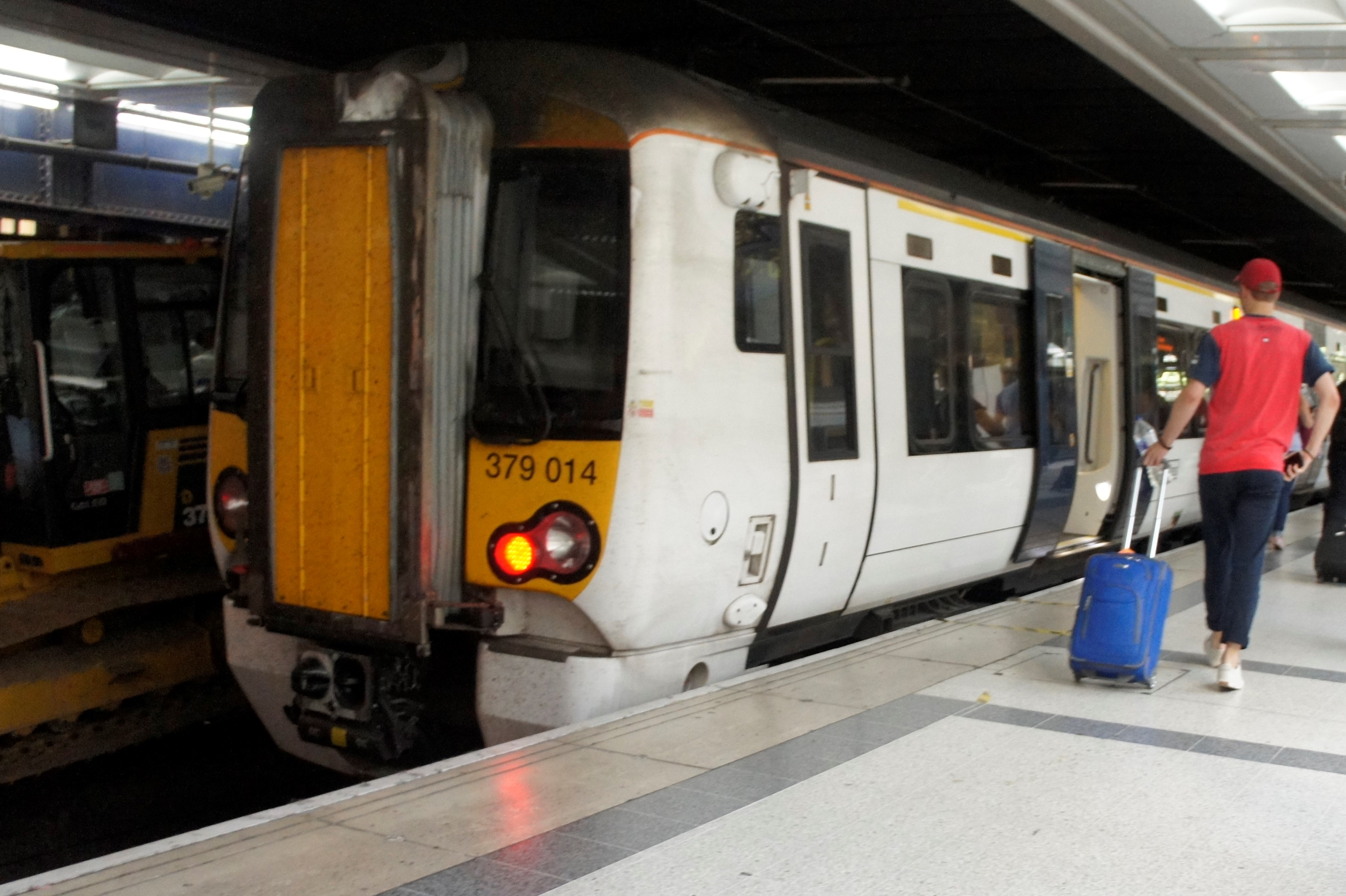 大盎格利亞鐵路的379系電聯車，利物浦街車站